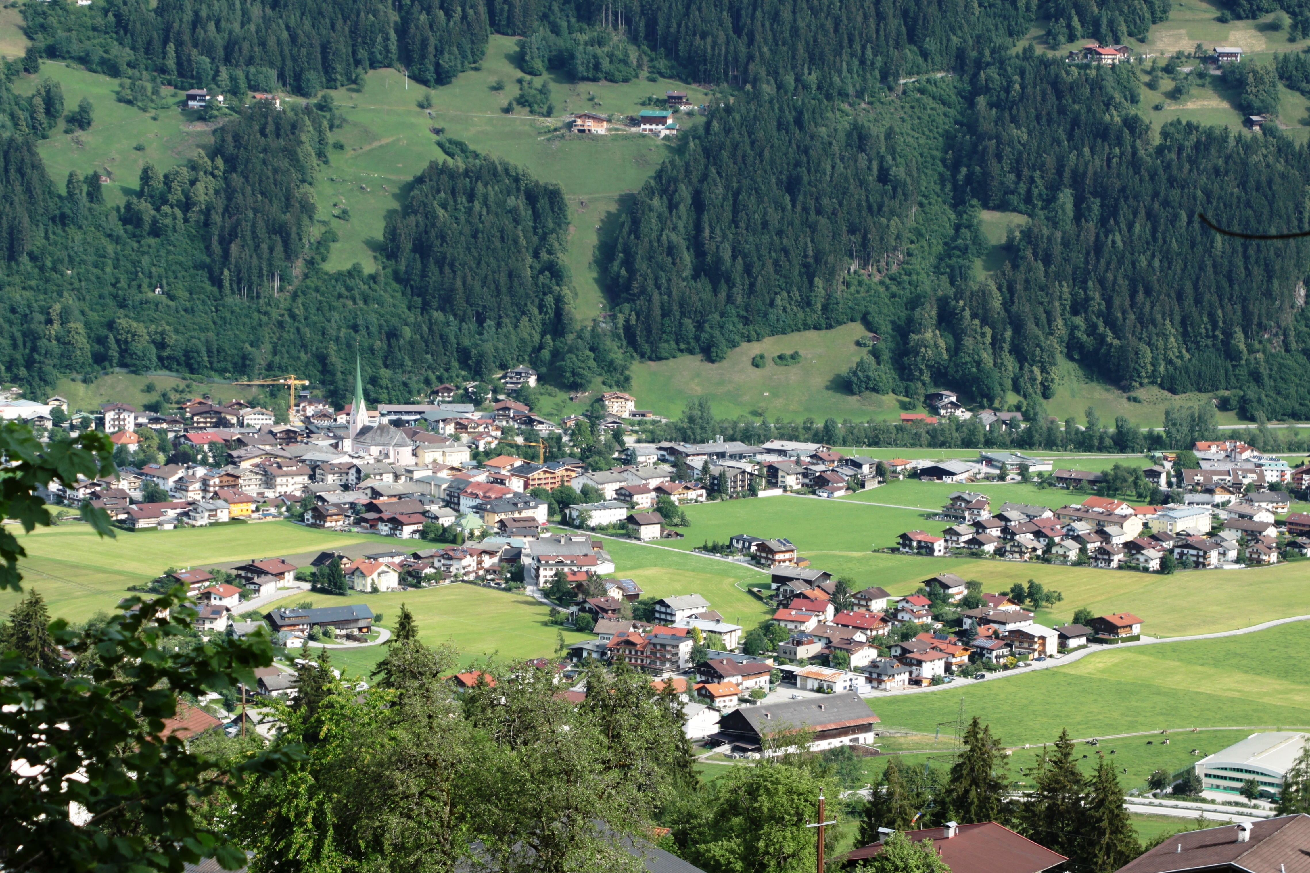 Zell am Ziller